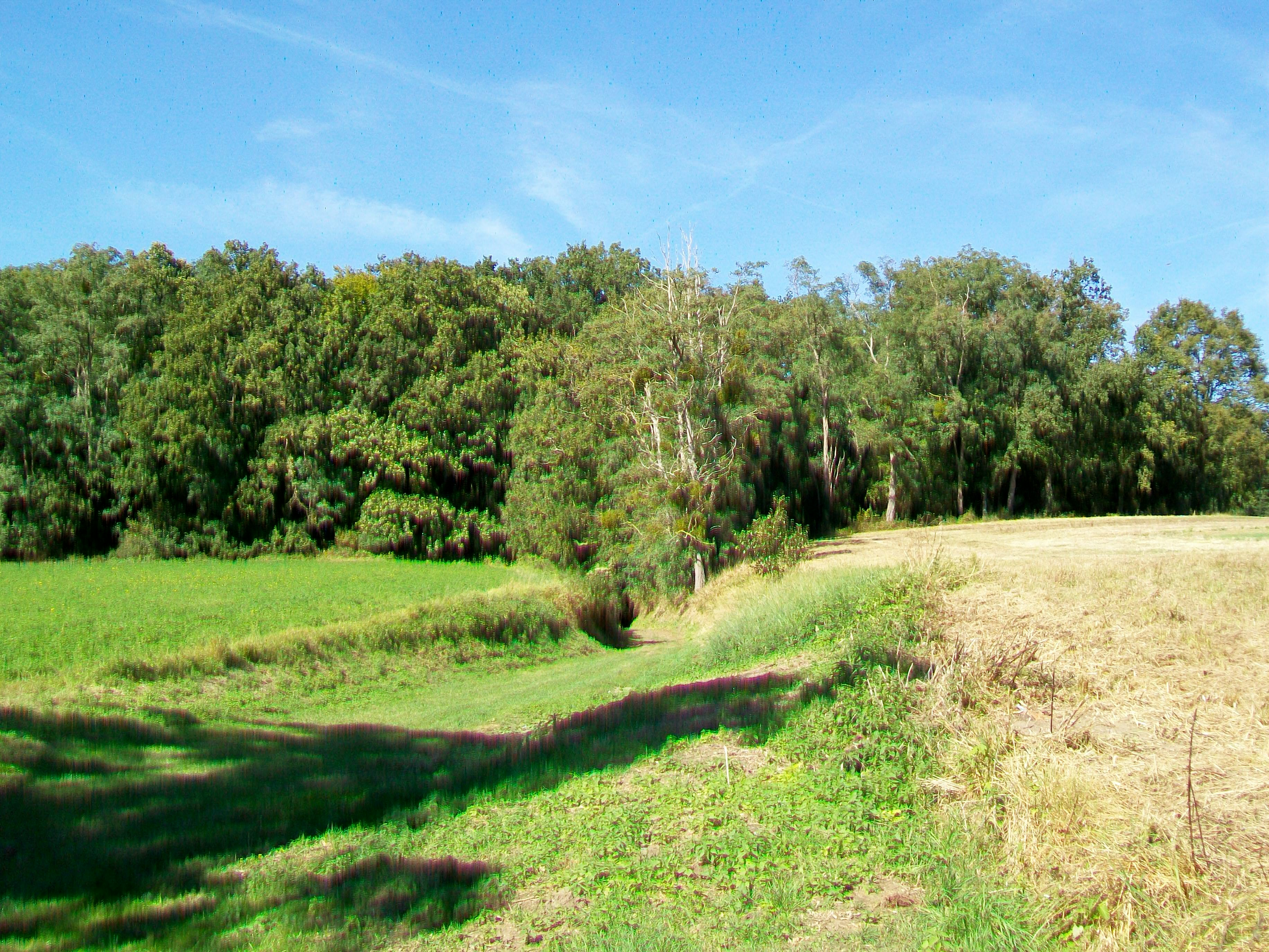 Vue vers la Motte du Moulin, butte boisée culminant à 120 m au-dessus du niveau de la mer.